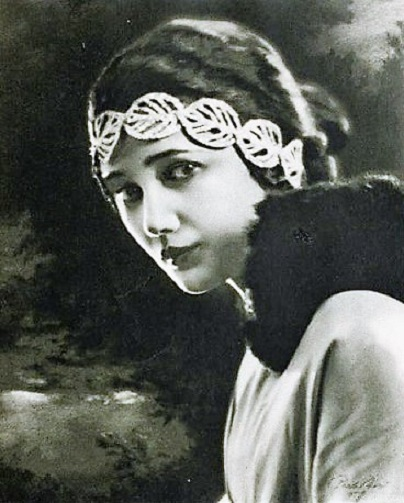 Jetta Goudal